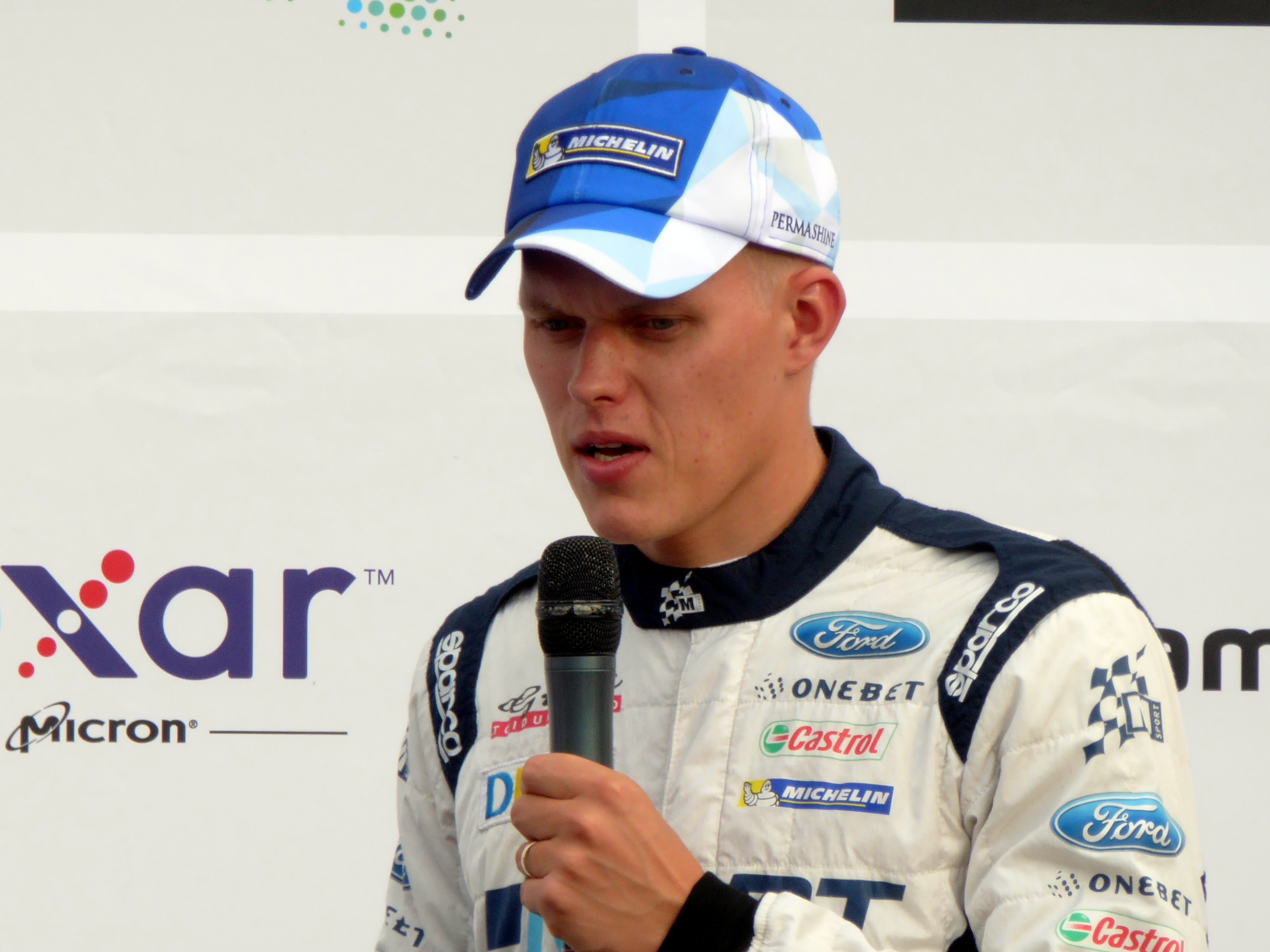 Rallye Deutschland 2017, Eröffnungszeremonie auf dem Tbilisser Platz in Saarbrücken